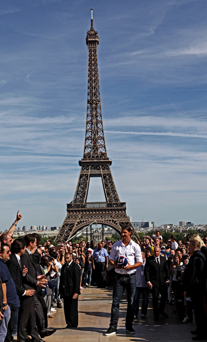 Zlatan Ibrahimovic au Trocadero devant une foule de supporters en liesse